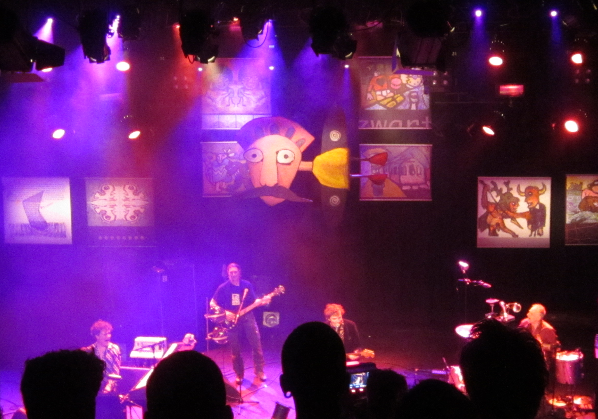 Fratsen, cd-presentatie Casper, 20 november 2014 in Metropool.